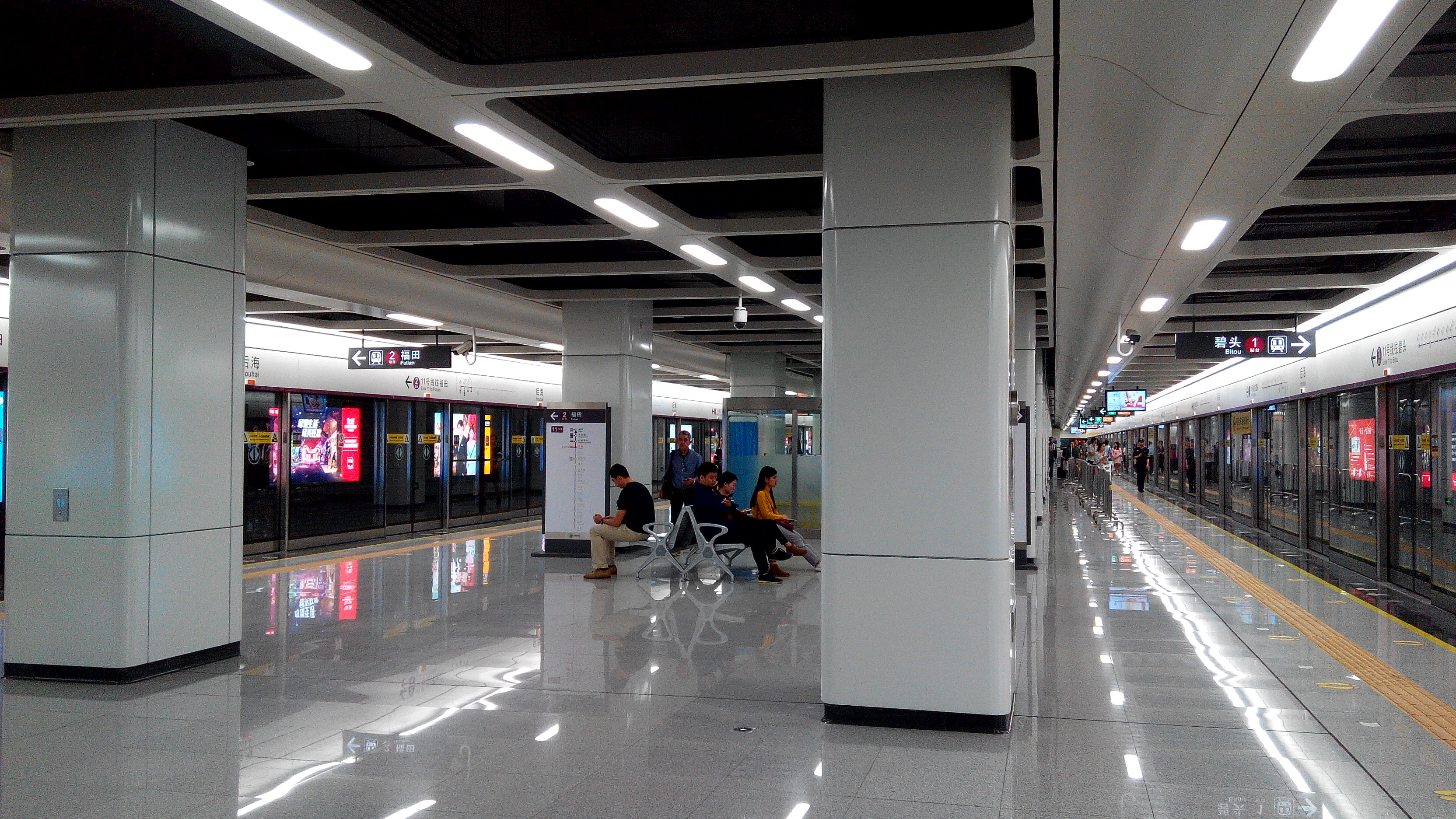 深圳地铁11号线 后海站站台